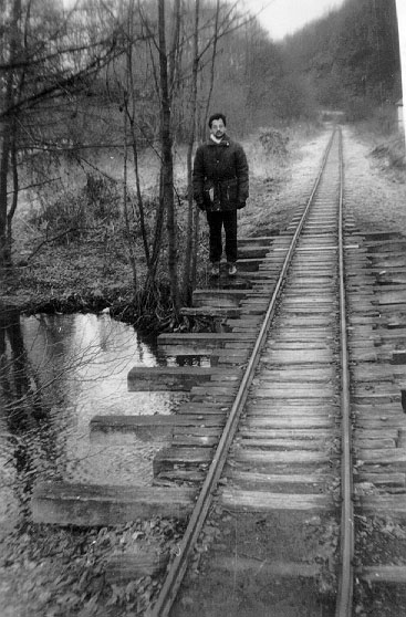 Kemencei Kisvasút, egyes híd